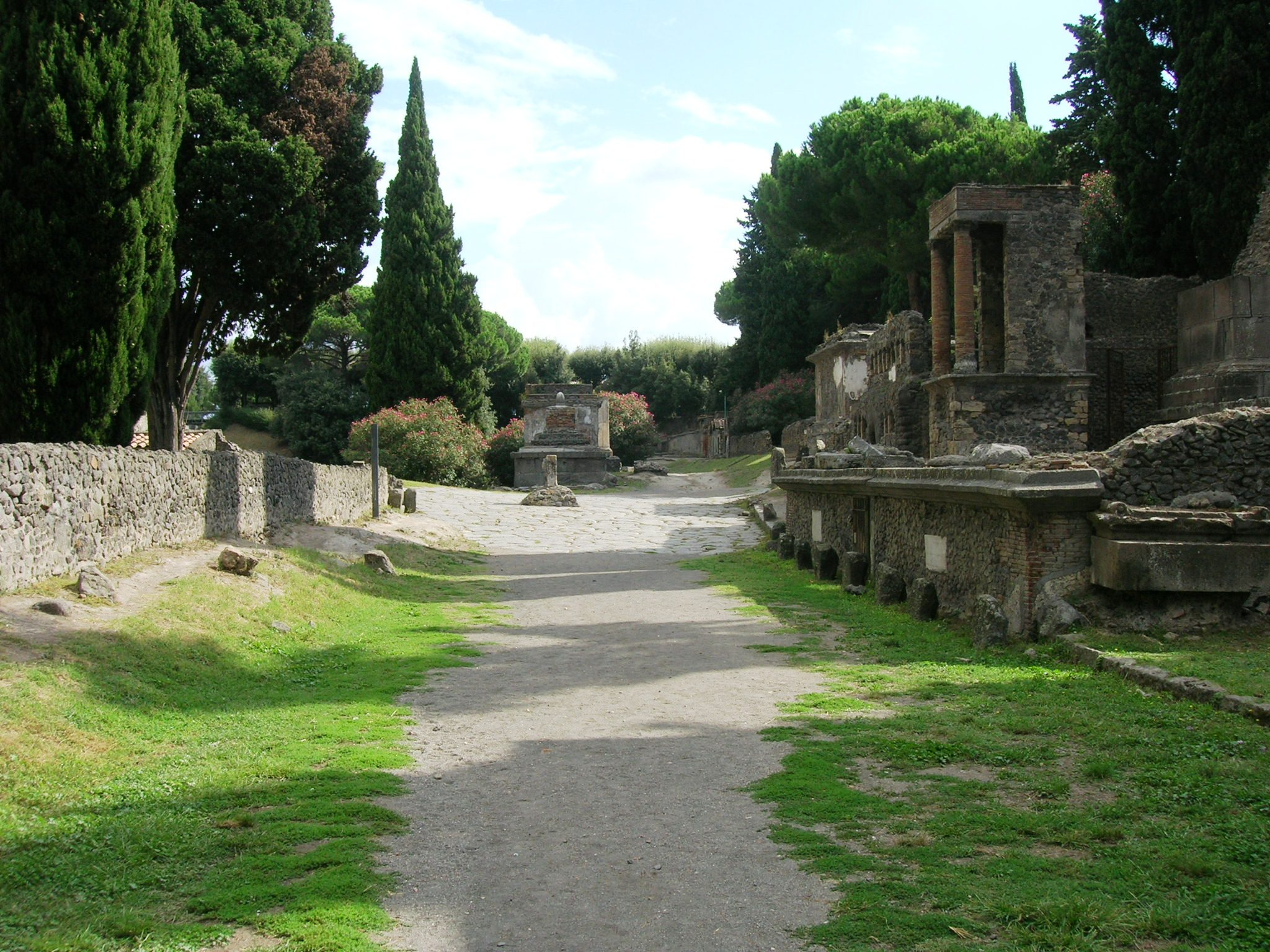 Tombe dell'area sud-ovest - MIBACT This is a photo of a monument which is part of cultural heritage of Italy.